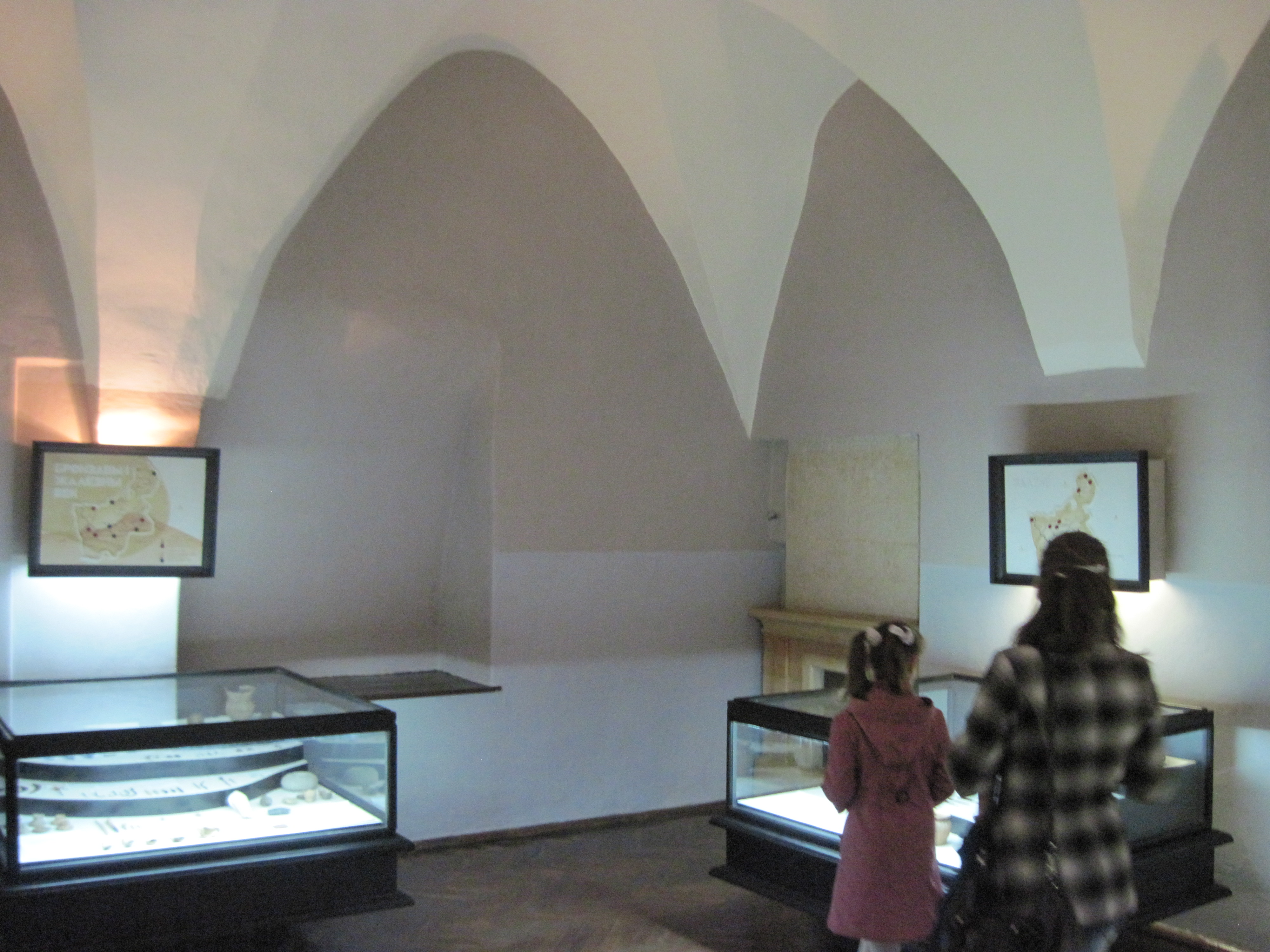 Стары замак. Палац. Першы паверх. Экспазіцыя музея